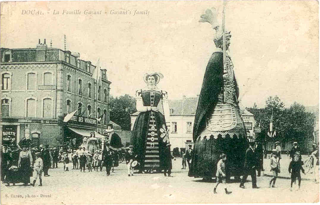 La famille Gayant, géants de Douai (France).